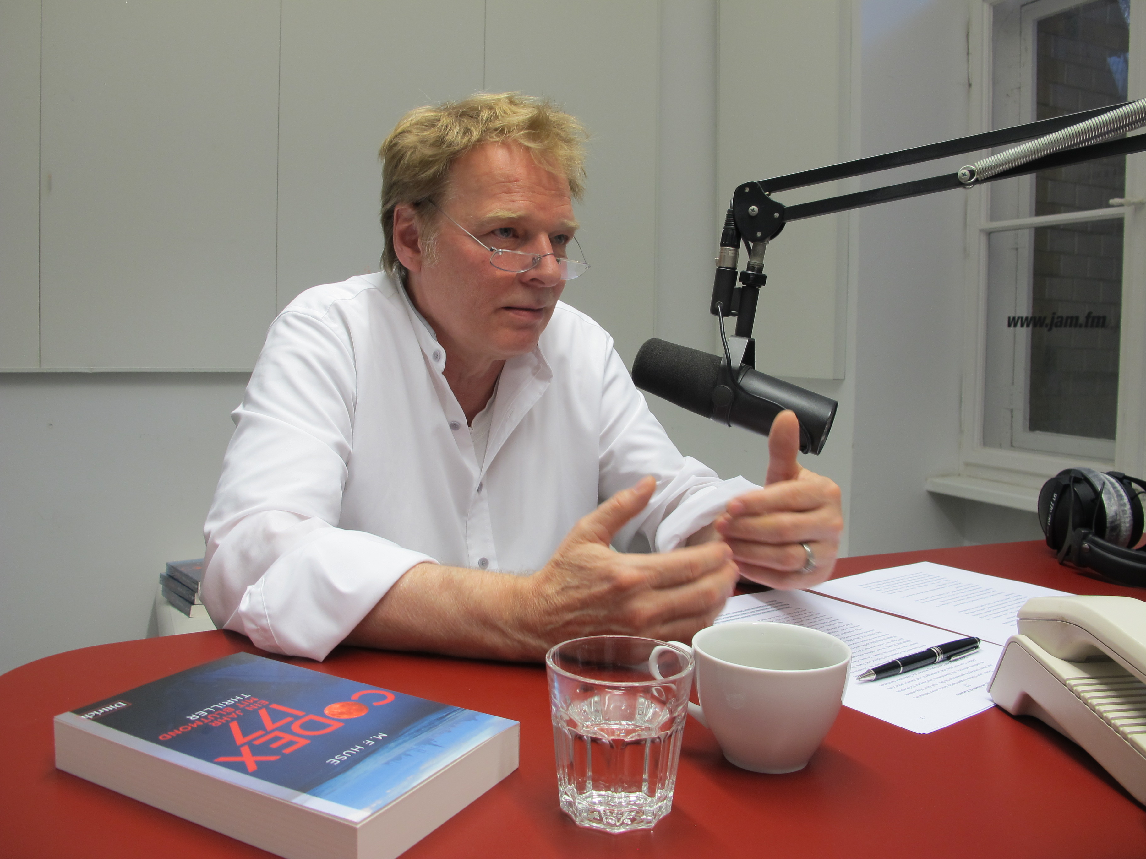 Radiointerview mit Michael F. Huse bei Radio Paradiso 98.2, 2018. Foto: © Amir Soufi